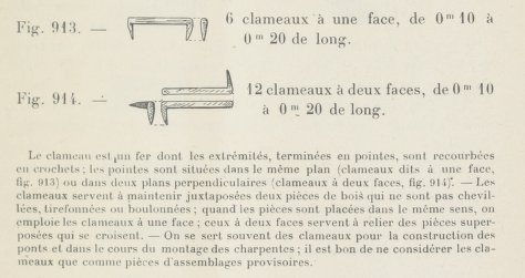 Paragraphe concernant les clameaux dans le Génie rural appliqué aux colonies : cours professé à l'Institut national d'agronomie coloniale (2e édition, revue et augmentée), par Max Ringelmann.